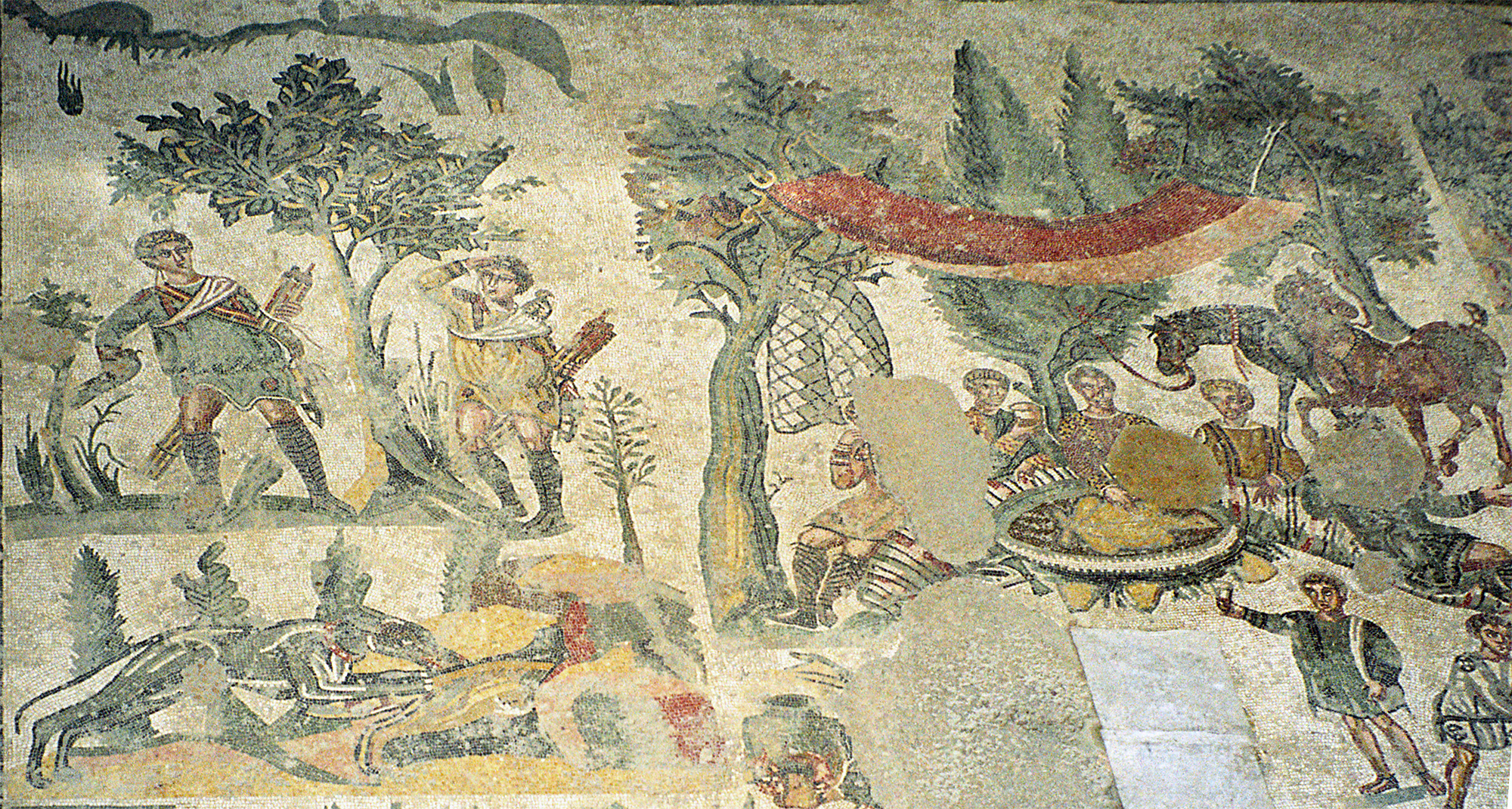 Sicily, Villa Romana del Casale